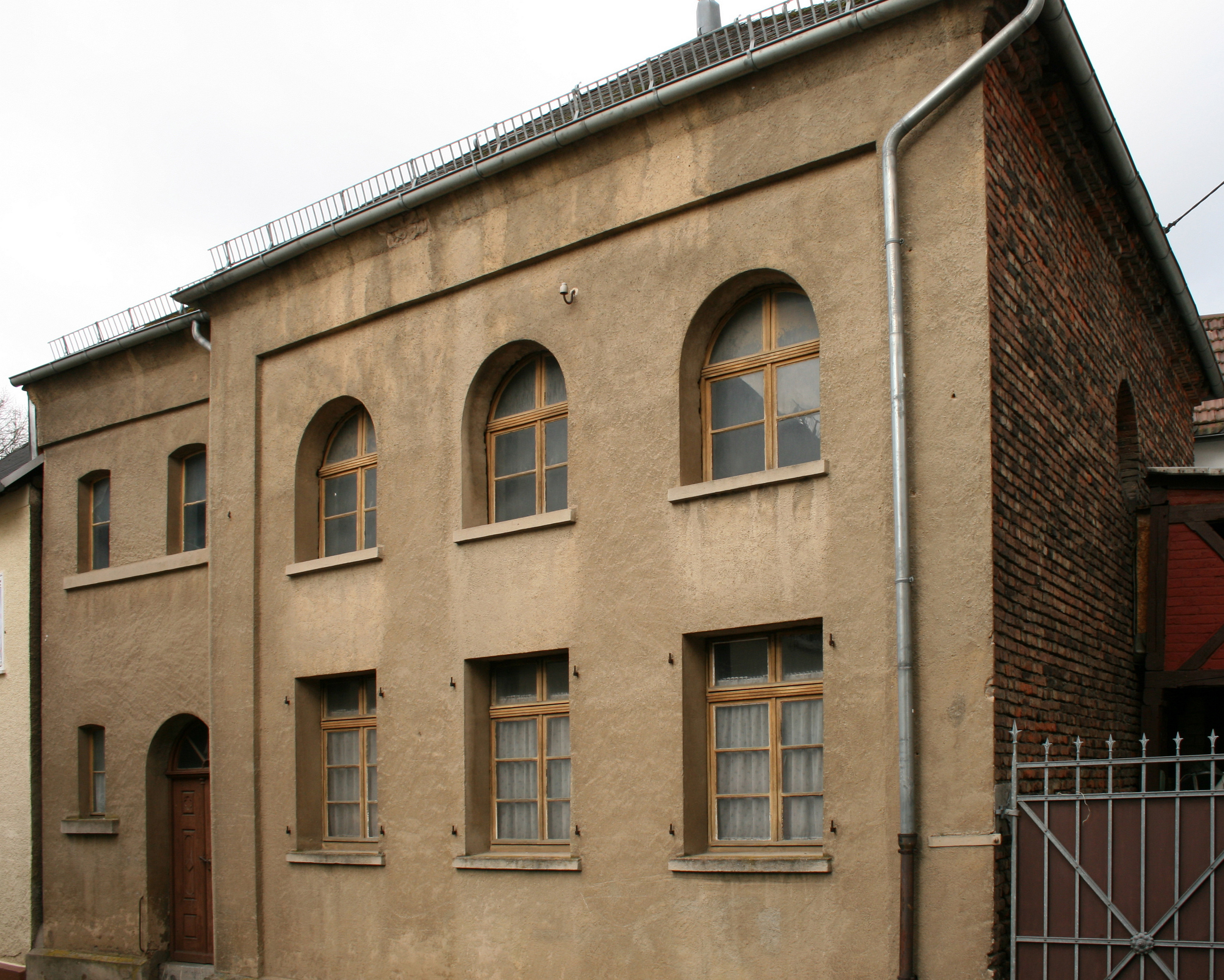 Ehemalige Synagoge in Schupbach, Deutschland